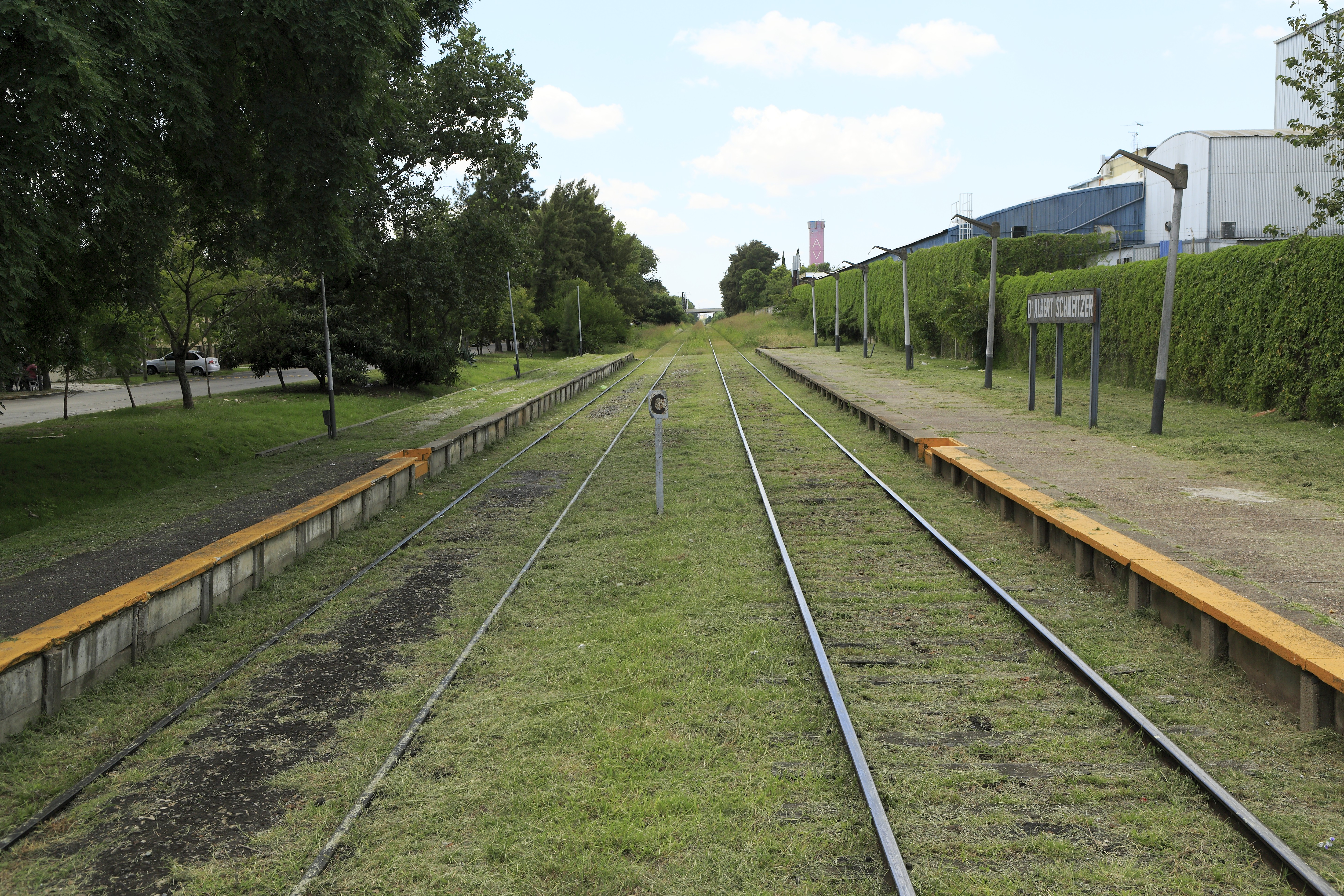 Streckensicht aus der Übergangstür Richtung Victoria, bis hier ist die Strecke zweigleisig. Über die Brücke im Hintergrund verläuft die RNA 003, Acceso norte ramal tigre. Im Bahnsteigbereich ist das Gras in den Gleisen gemäht worden.